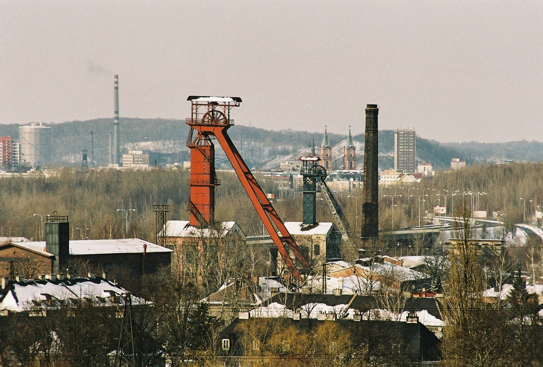 Alexander coal mine, Ostrava, Czech Republic